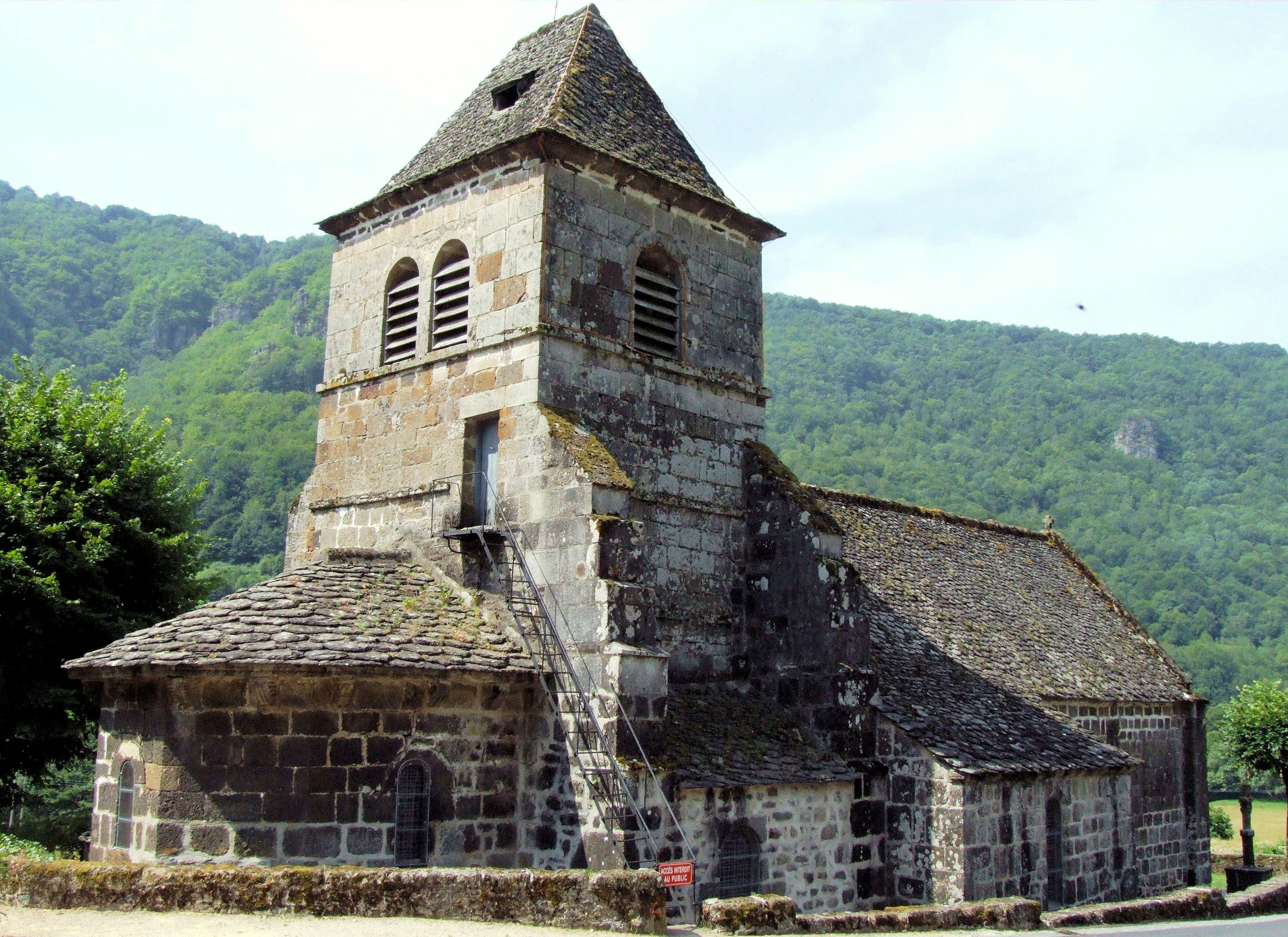 Saint-Vincent-de-Salers - Eglise Saint-Vincent